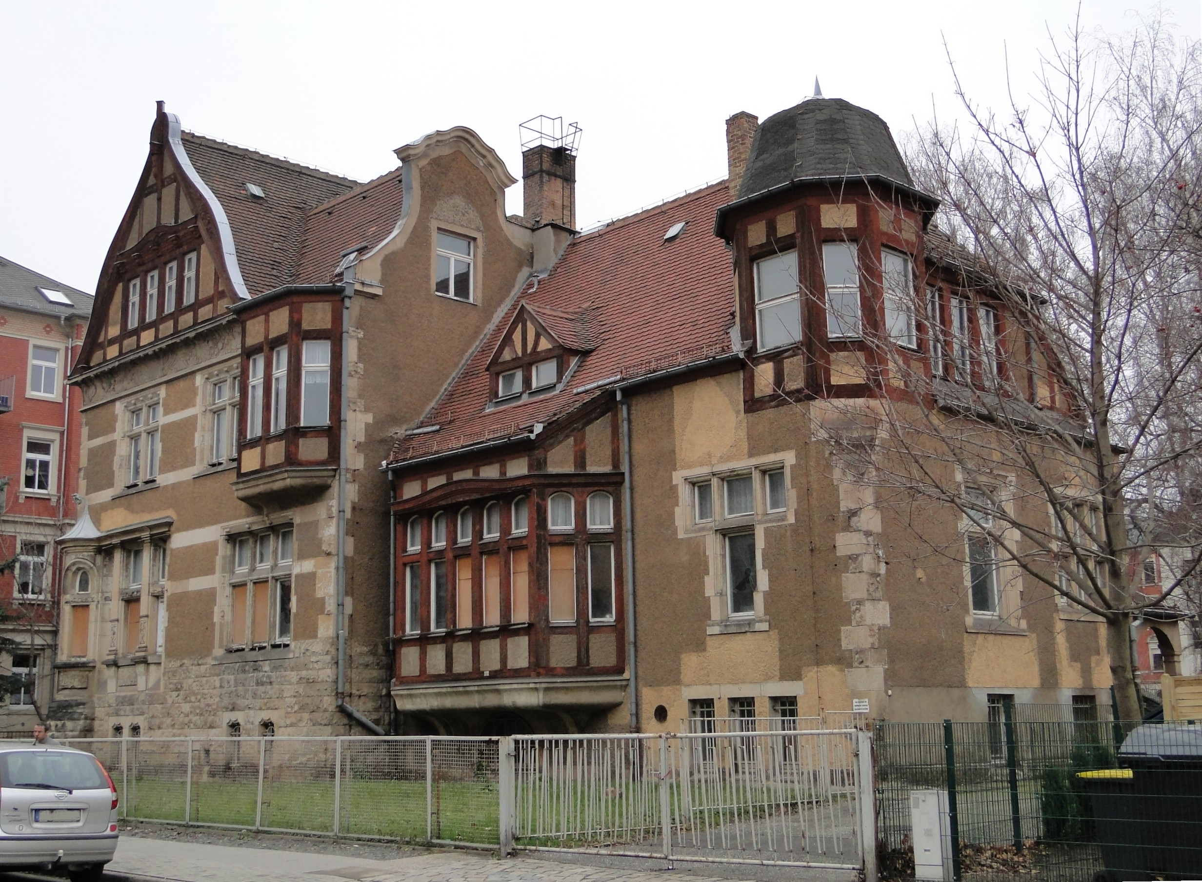 leerstehende Villa „Friedrichsruh“ in Dresden-Löbtau, Hermsdorfer Straße 16; erbaut 1898 nach Entwurf der Dresdner Architekten Rudolf Schilling und Julius Wilhelm Graebner; unter Denkmalschutz